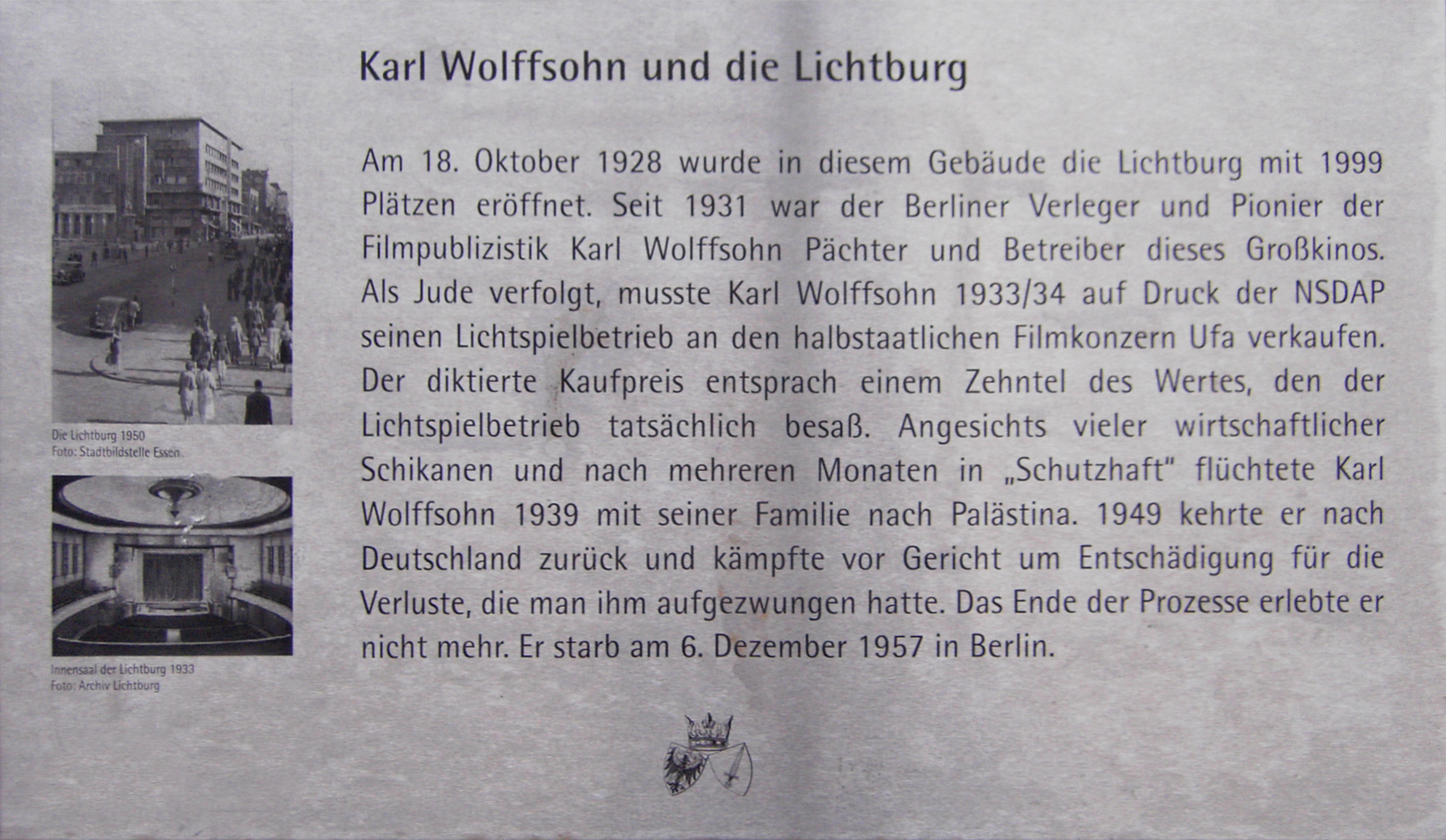 Gedenktafel für Karl Wolffsohn, den ehemaligen Pächter und Betreiber des Essener Kinos Lichtburg